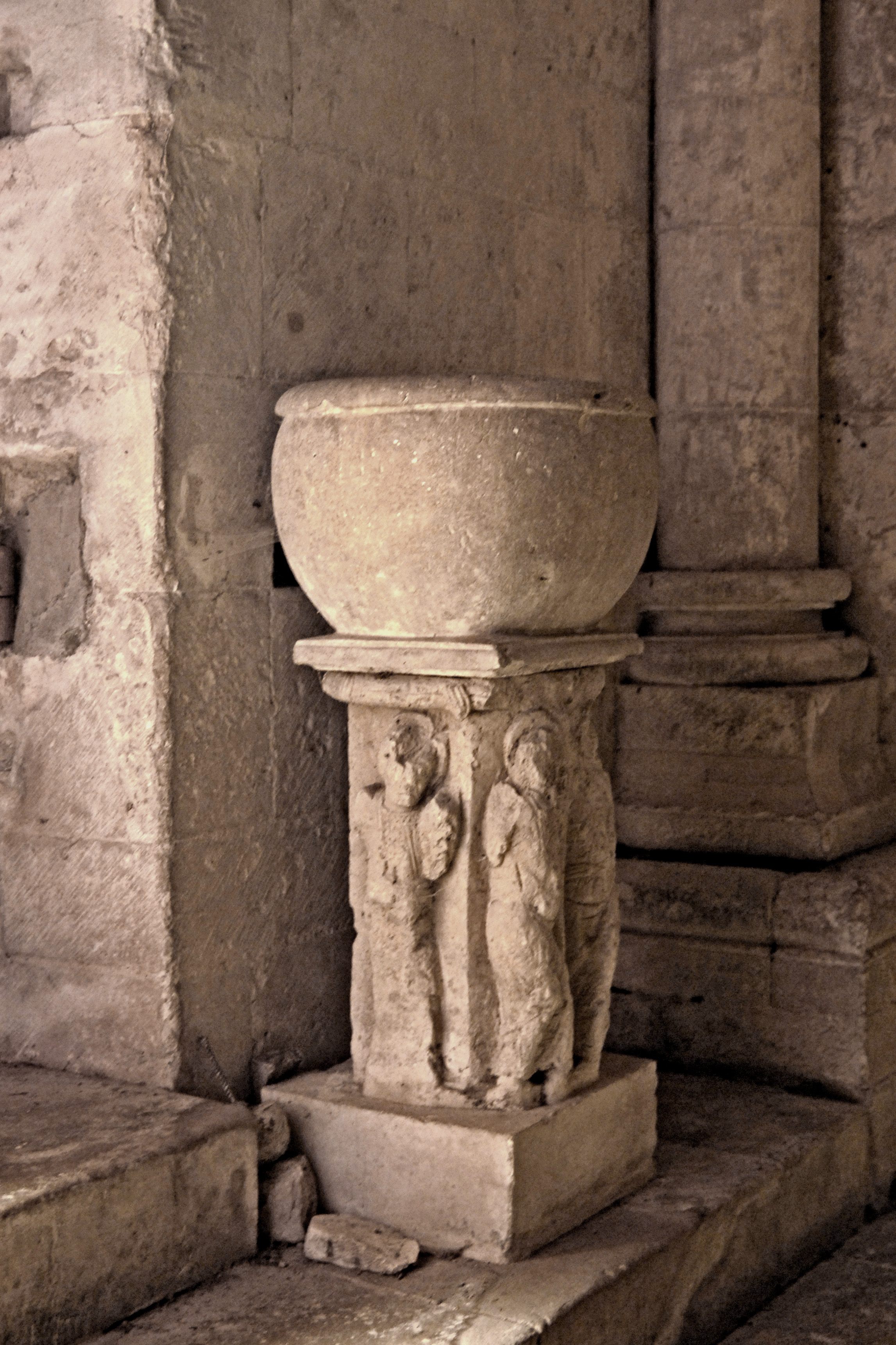 St.-Pierre Aulnay, Vierung und Chor